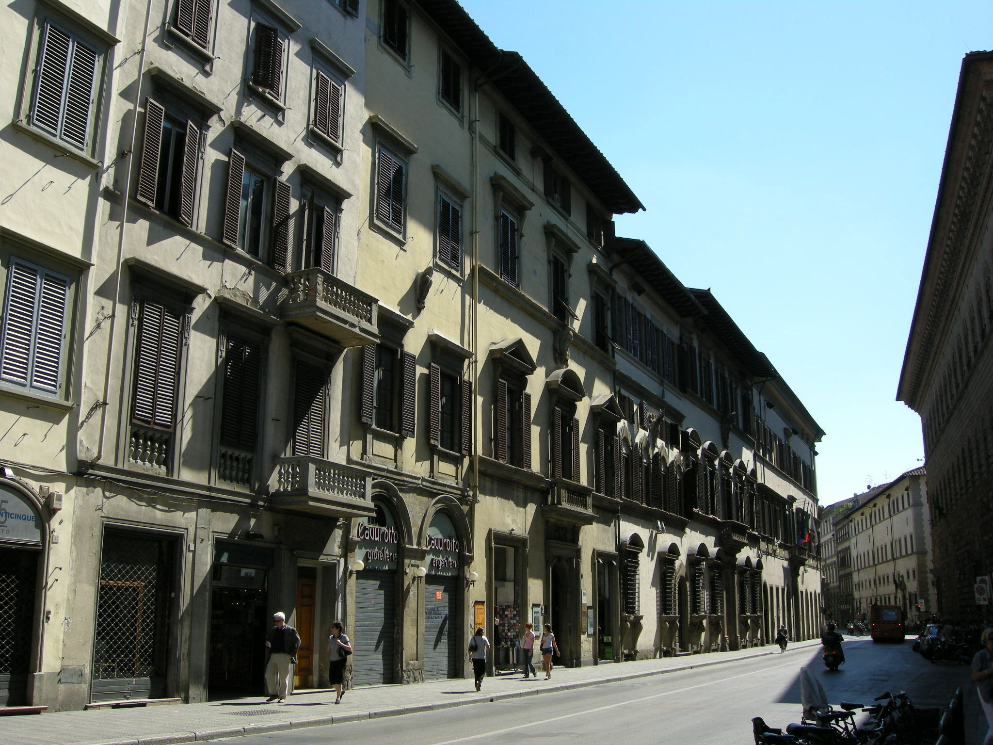 Via cavour, palazzi vari